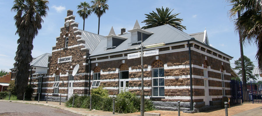 Middelburg stasie